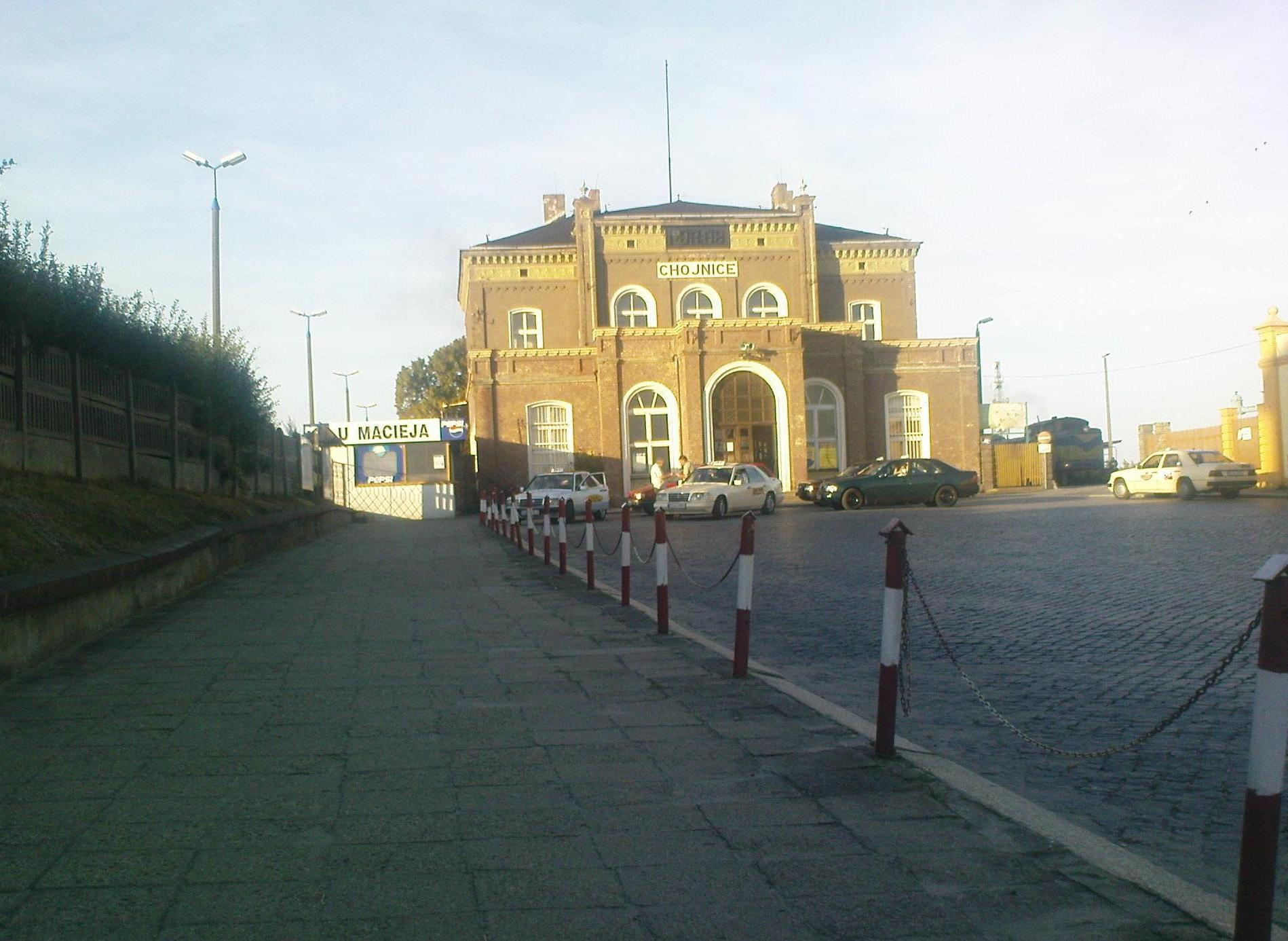 Dworzec kolejowy w Chojnicach.